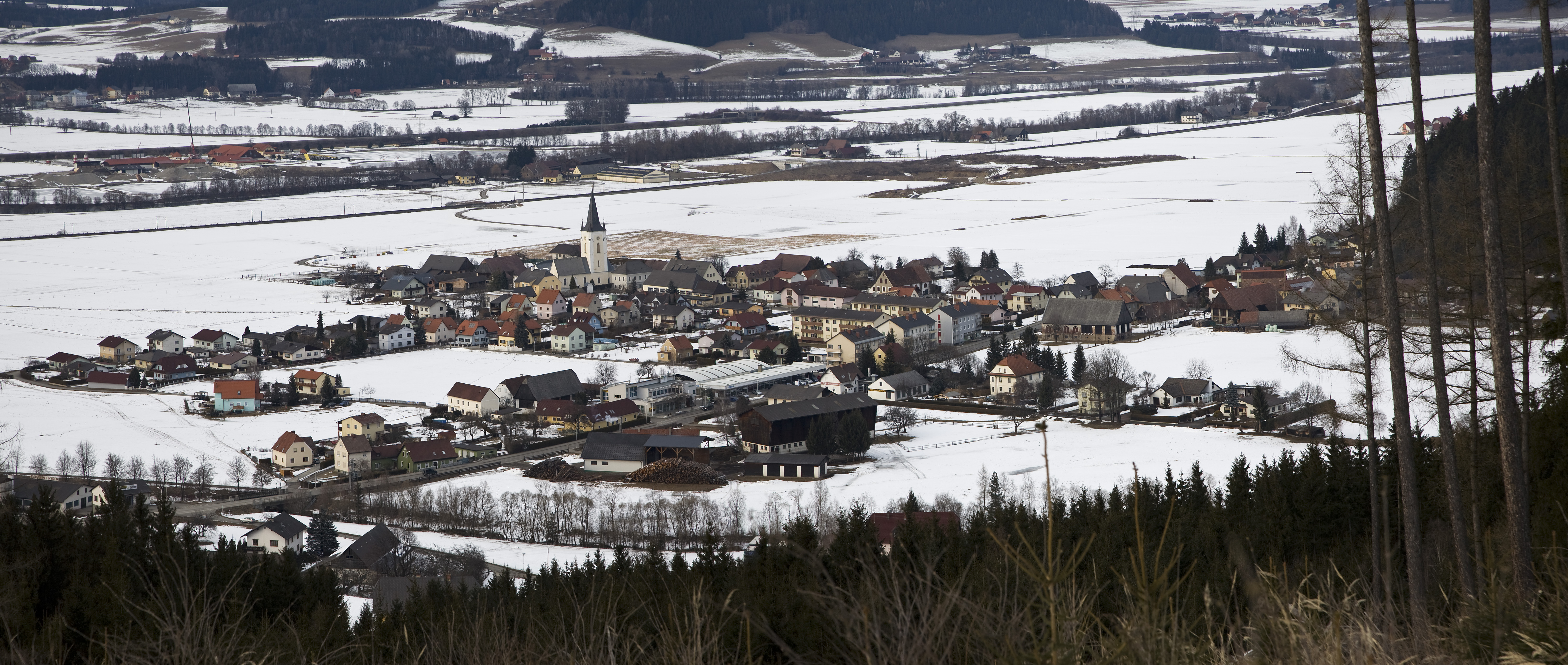 Blick vom Gobernitzberg auf Sankt Margarethen bei Knittelfeld. Das Foto zeigt den Ort von Süden.